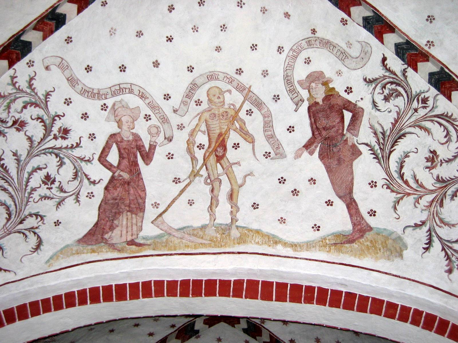 Loxstedter Totentanz, Kalkmalerei 15. Jahrhundert. Loxstedt, St. Marien